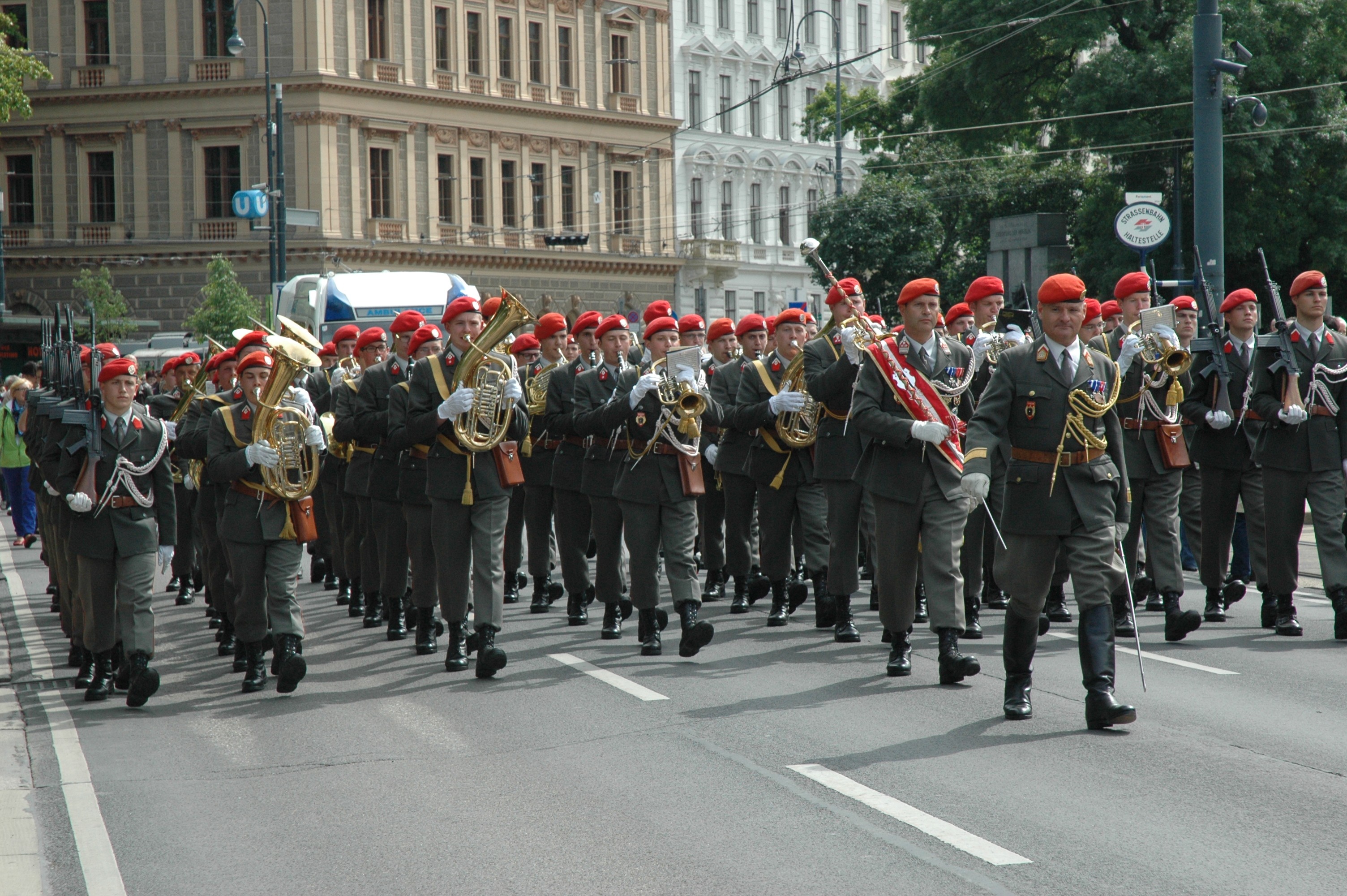 Blasmusik-Festumzug am Ring aus Anlass des 34. Österreichischen Blasmusikfestes in Wien Personality rights warning Although this work is freely licensed or in the public domain, the person(s) shown may have rights that legally restrict certain re-uses unless those depicted consent to such uses. In these cases, a model release or other evidence of consent could protect you from infringement claims.